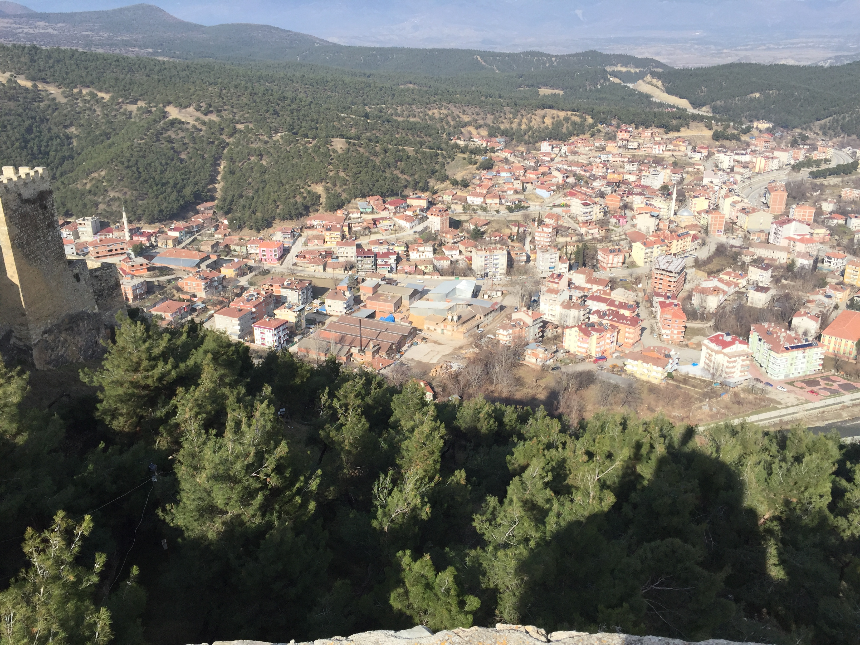 BOYABAT KALESİ